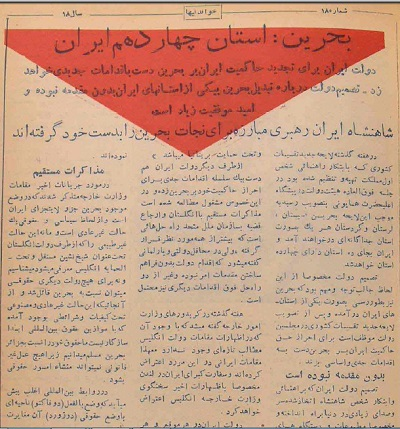 تصویر صفحه‌ای از مجلهٔ خواندنیها دربارهٔ اعلام بحرین به عنوان استان چهاردهم ایران